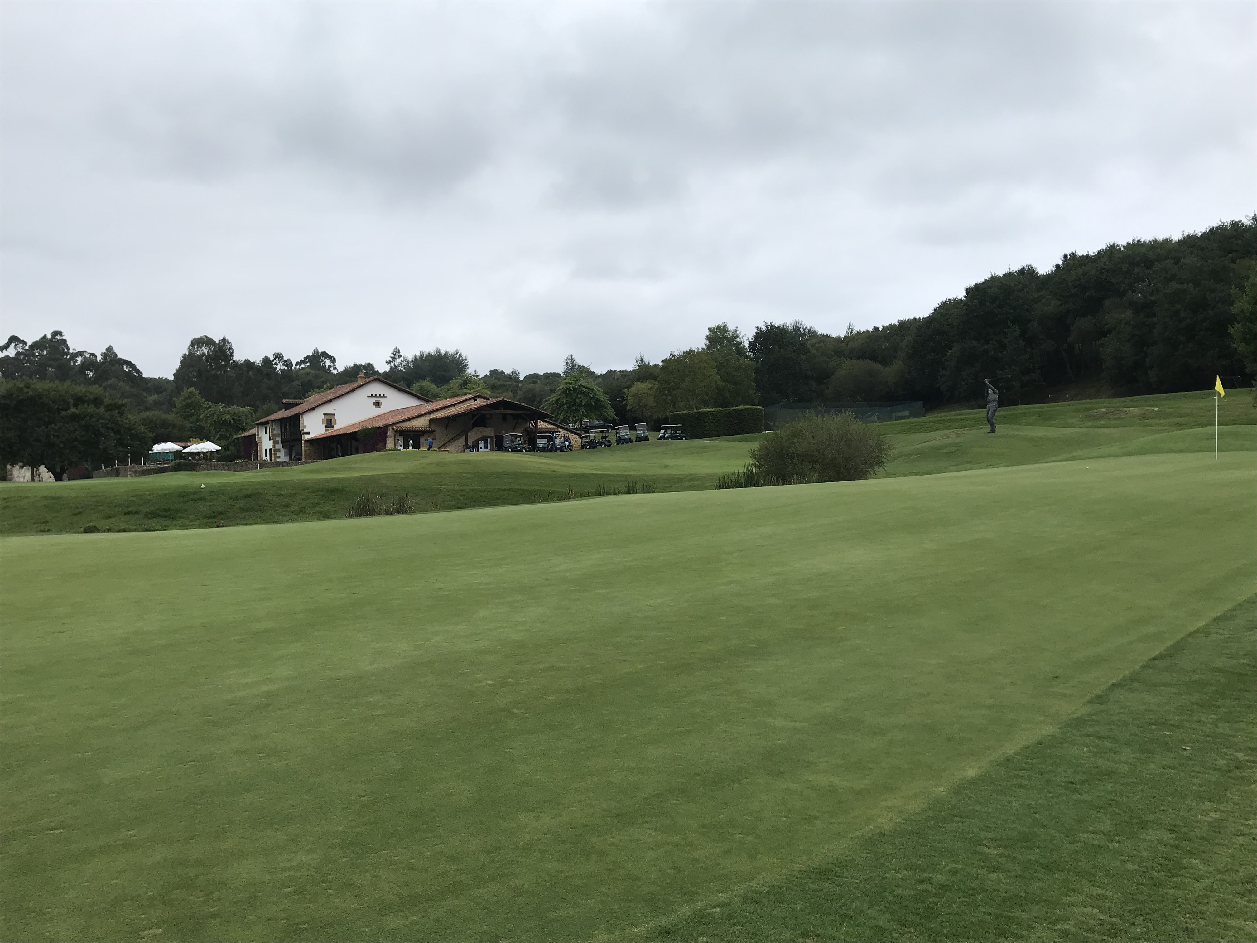 Club de Golf de Santa Marina en Lamadrid, Comillas.